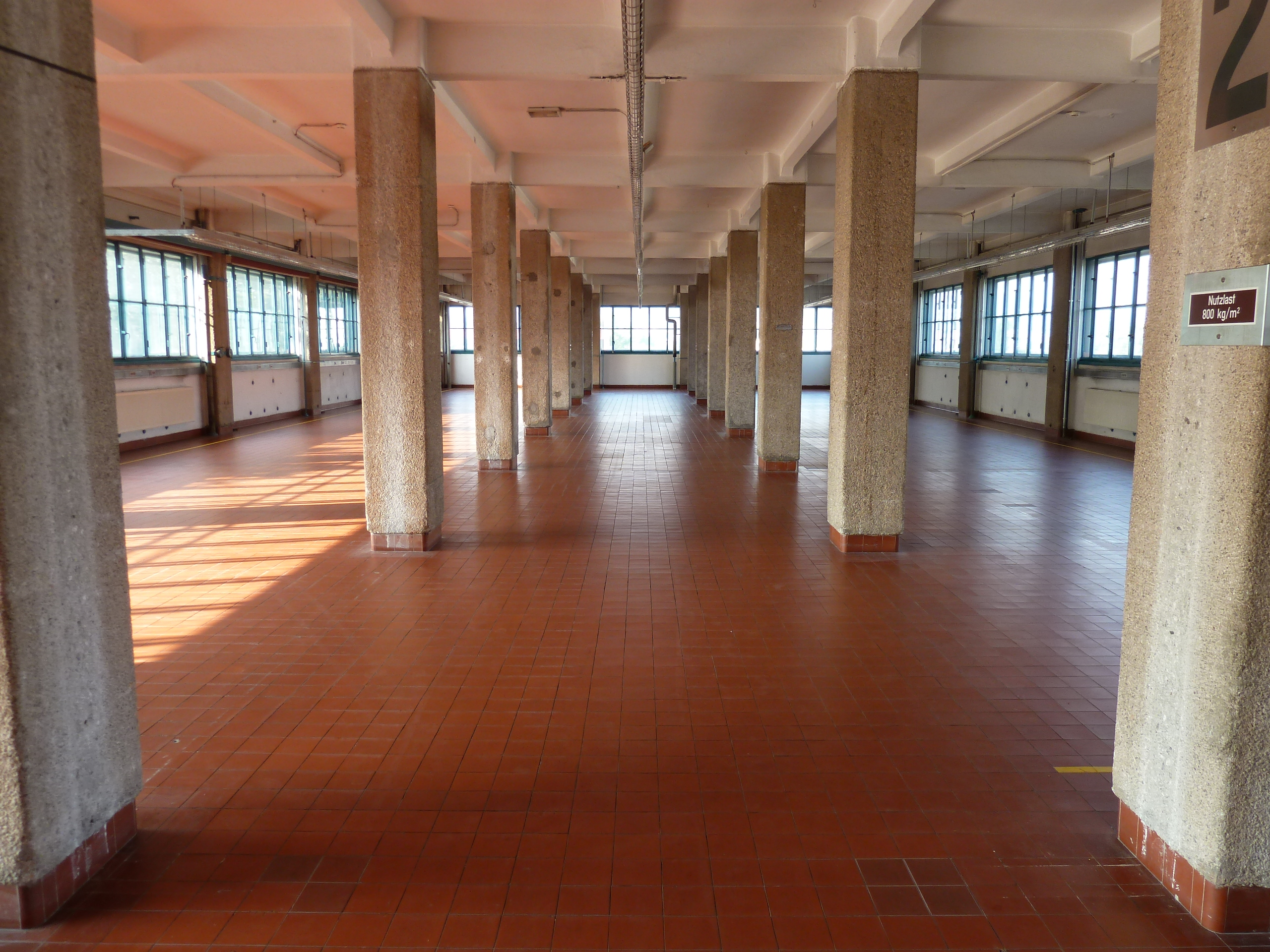 2. Obergeschoß im Pfeiffentabakfabrikationsgebäude der Tabakfabrik Linz